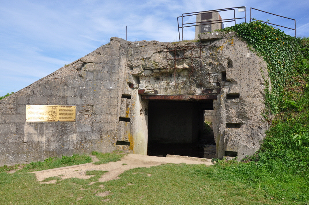 Omaha Beach, německý bunkr